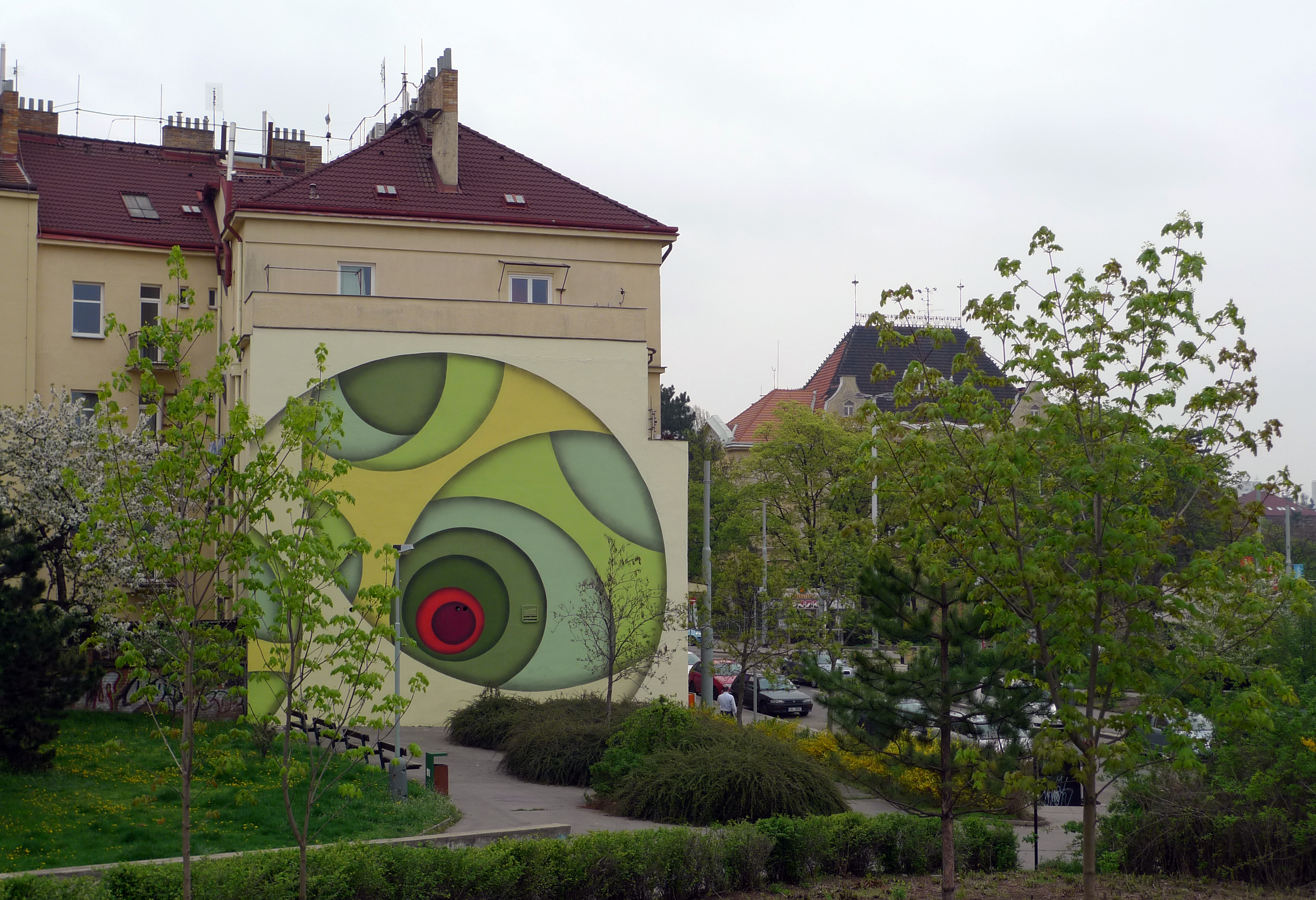 Mural art Jana Kalába na obecním domě U Sandholzů v Praze 10-Strašnicích z dubna 2013.